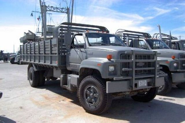 Camión De Transporte De Tropa